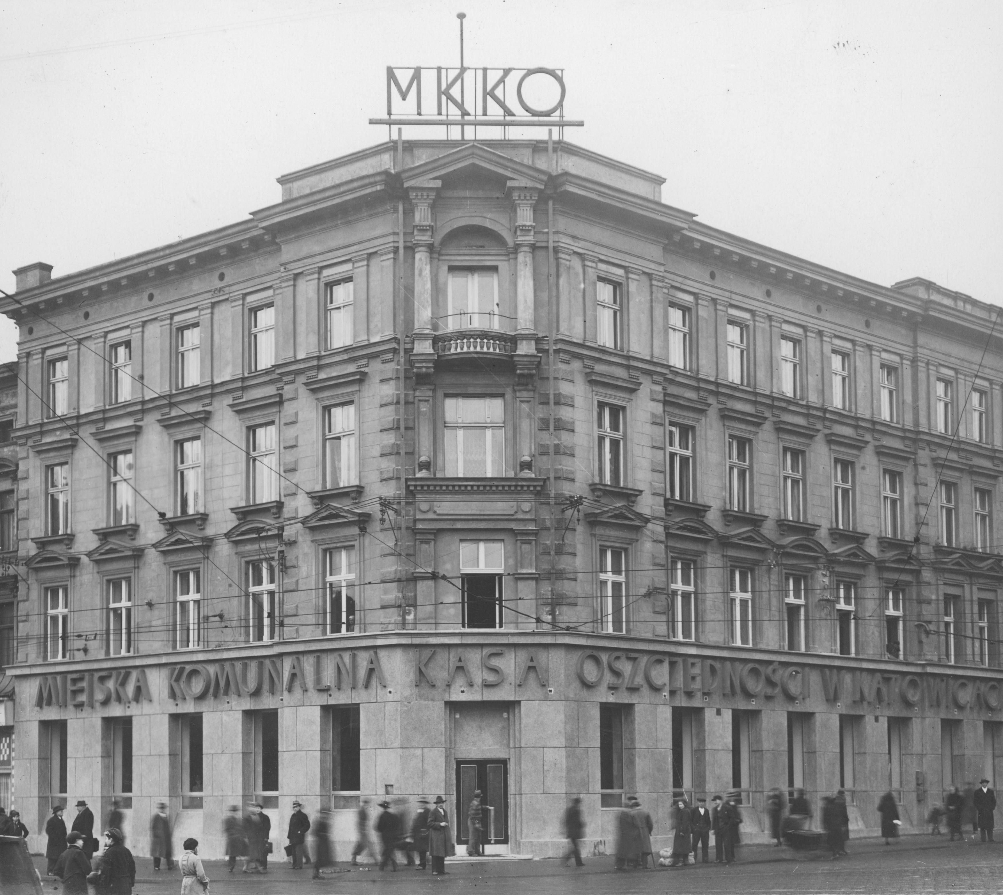 Budynek Miejskiej Komunalnej Kasy Oszczędności (wcześniej Hotel de Prusse) na rynku w Katowicach pod numerem 10, spalony w 1945 roku.